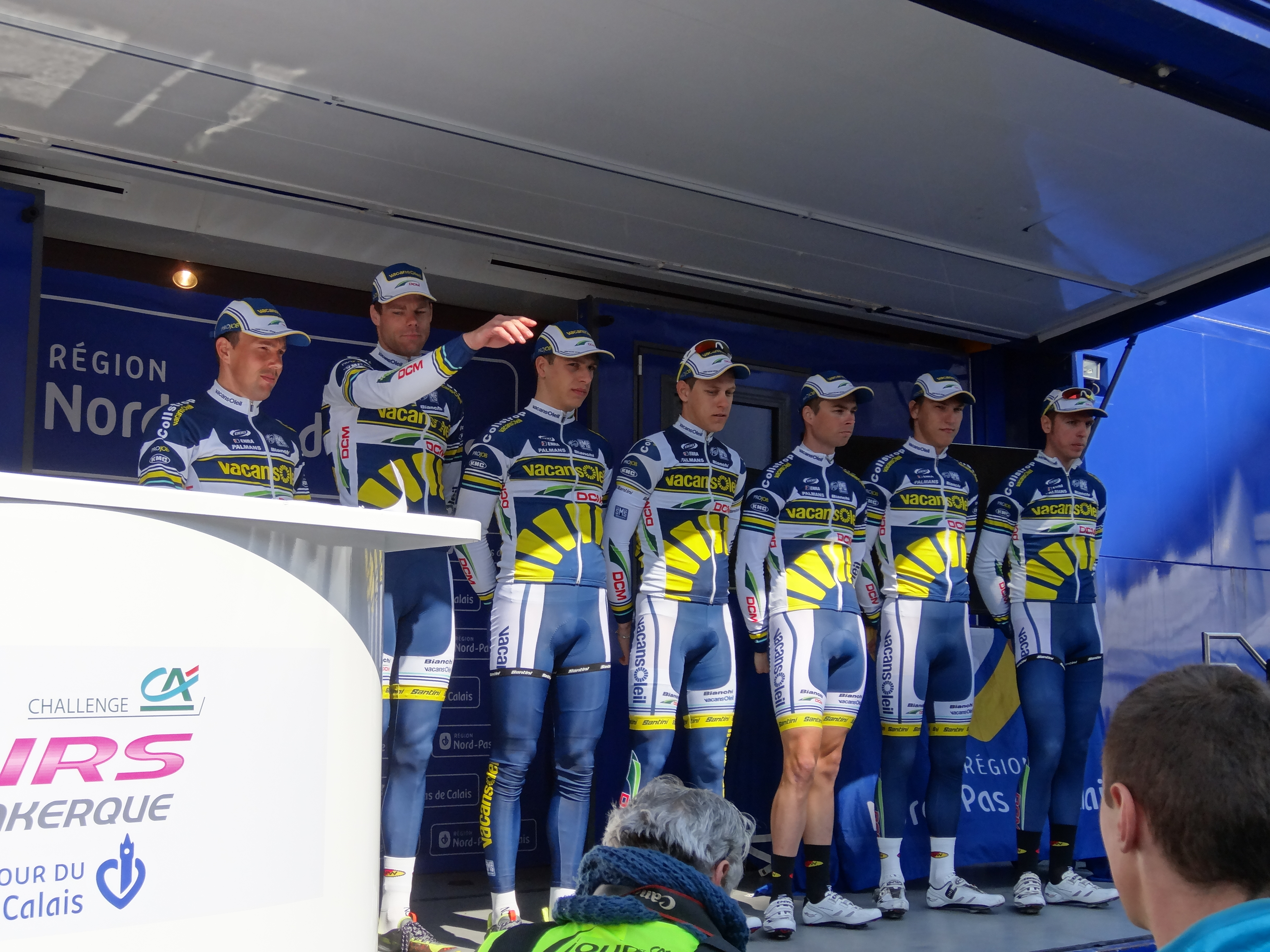 Reportage photographique réalisé le mercredi 1er mai 2013 au départ de la première étape de l'édition 2013 des Quatre jours de Dunkerque à Dunkerque, Nord, Nord-Pas-de-Calais, France. Le dossier photographique montre des véhicules de course exposés, la caravane publicitaire, la présentation des coureurs, et le départ. Depicted people: Kenny van Hummel, Wouter Mol, Danny van Poppel, Wesley Kreder and Bert-Jan Lindeman